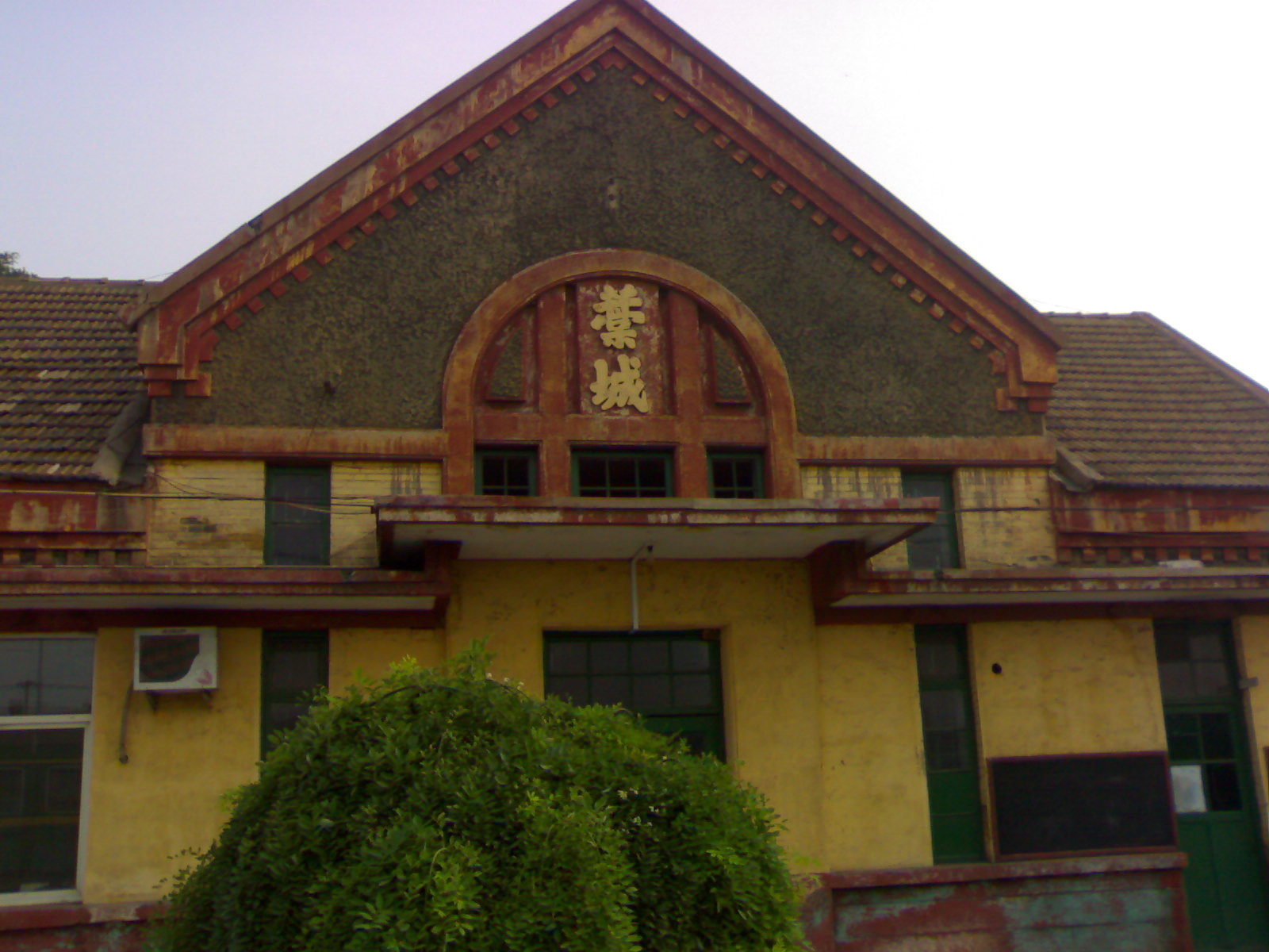 藁城站锅炉房，摄于2012年7月15日。